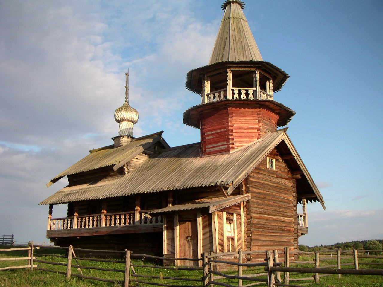 Часовня петра и павла (Республика Карелия, Медвежьегорск, деревня Носоновщина на волкострове)